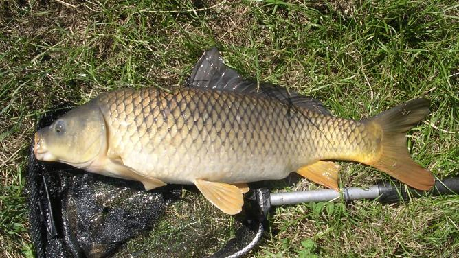 volbloed wilde karper door mij gevangen en gefotografeerd. Deze foto mag van mij in alle talen van Wikipedia vertoond worden